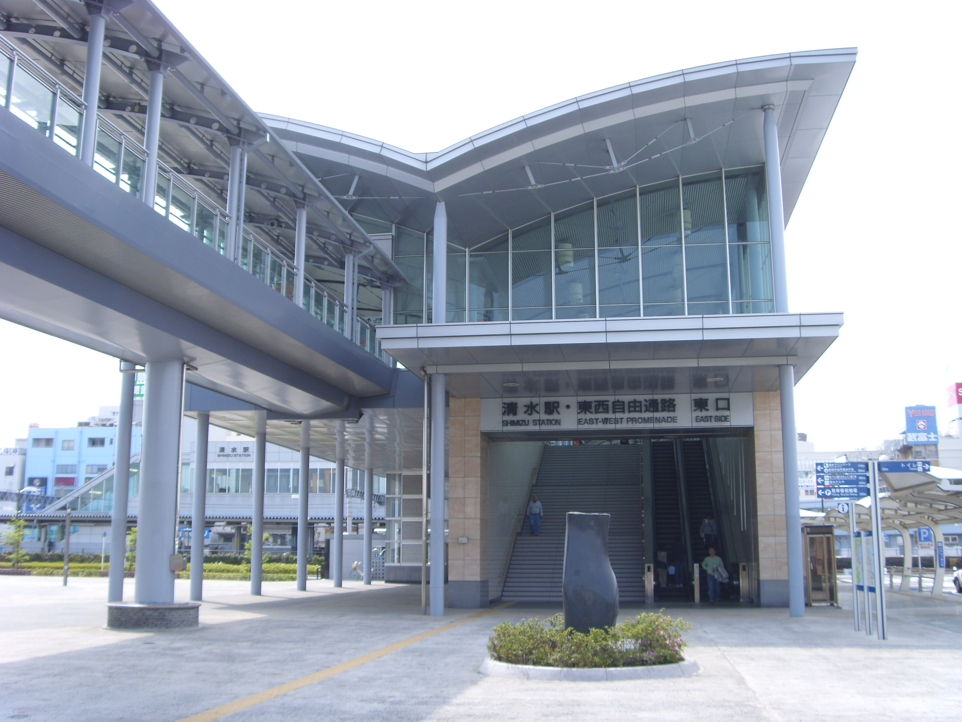 Shimizu Station Shizuoka East Gate